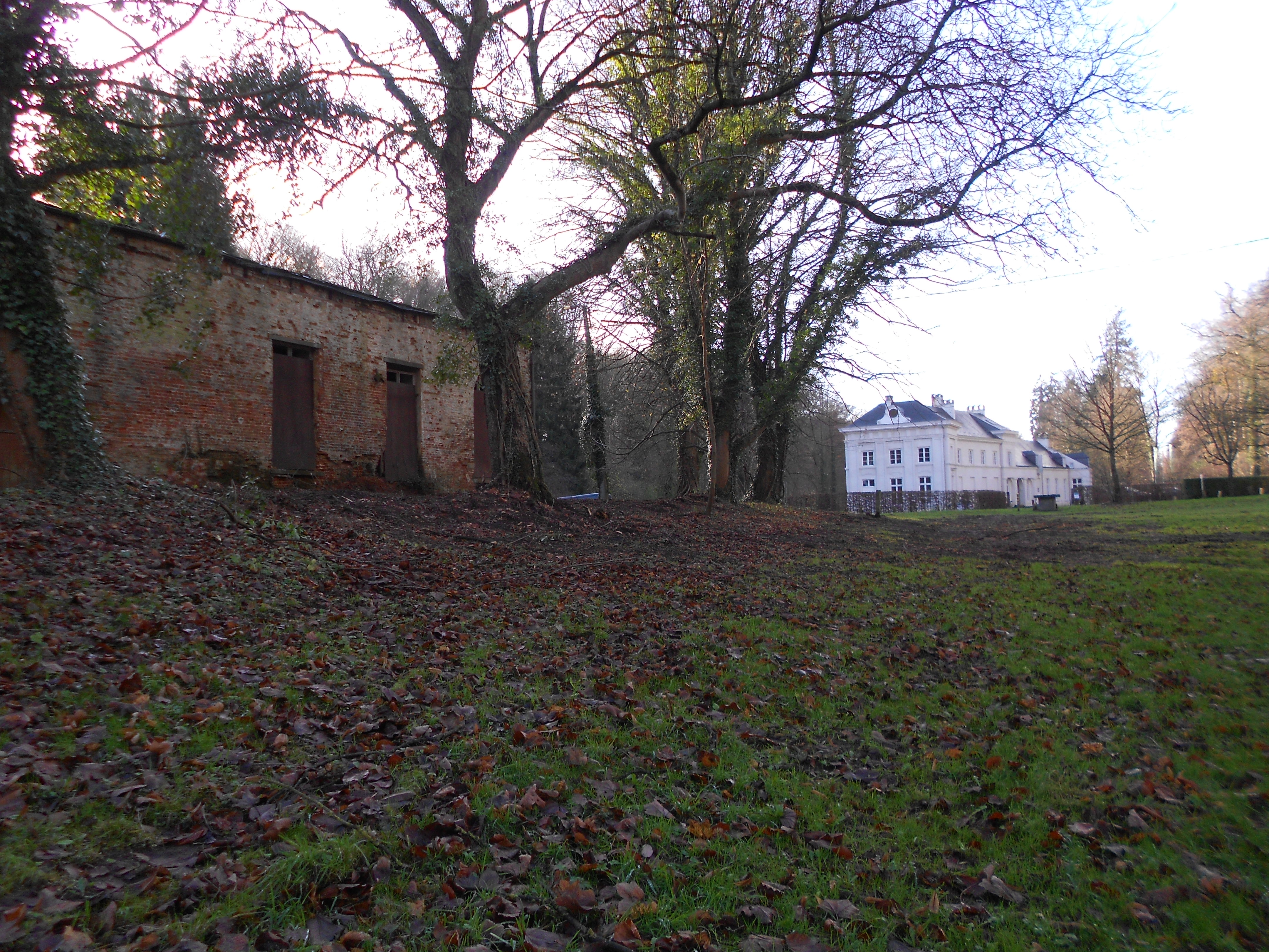 Voormalige kerk (links vooraan) en priorshuis (rechts achteraan) van de priorij van Groenendaal (Hoeilaart).